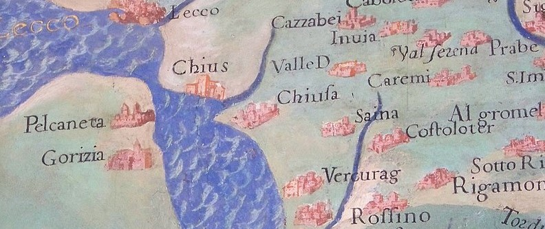 Il nome Vercurago dipinto nelle gallerie geografiche vaticane con il toonimo di "Vercurag"